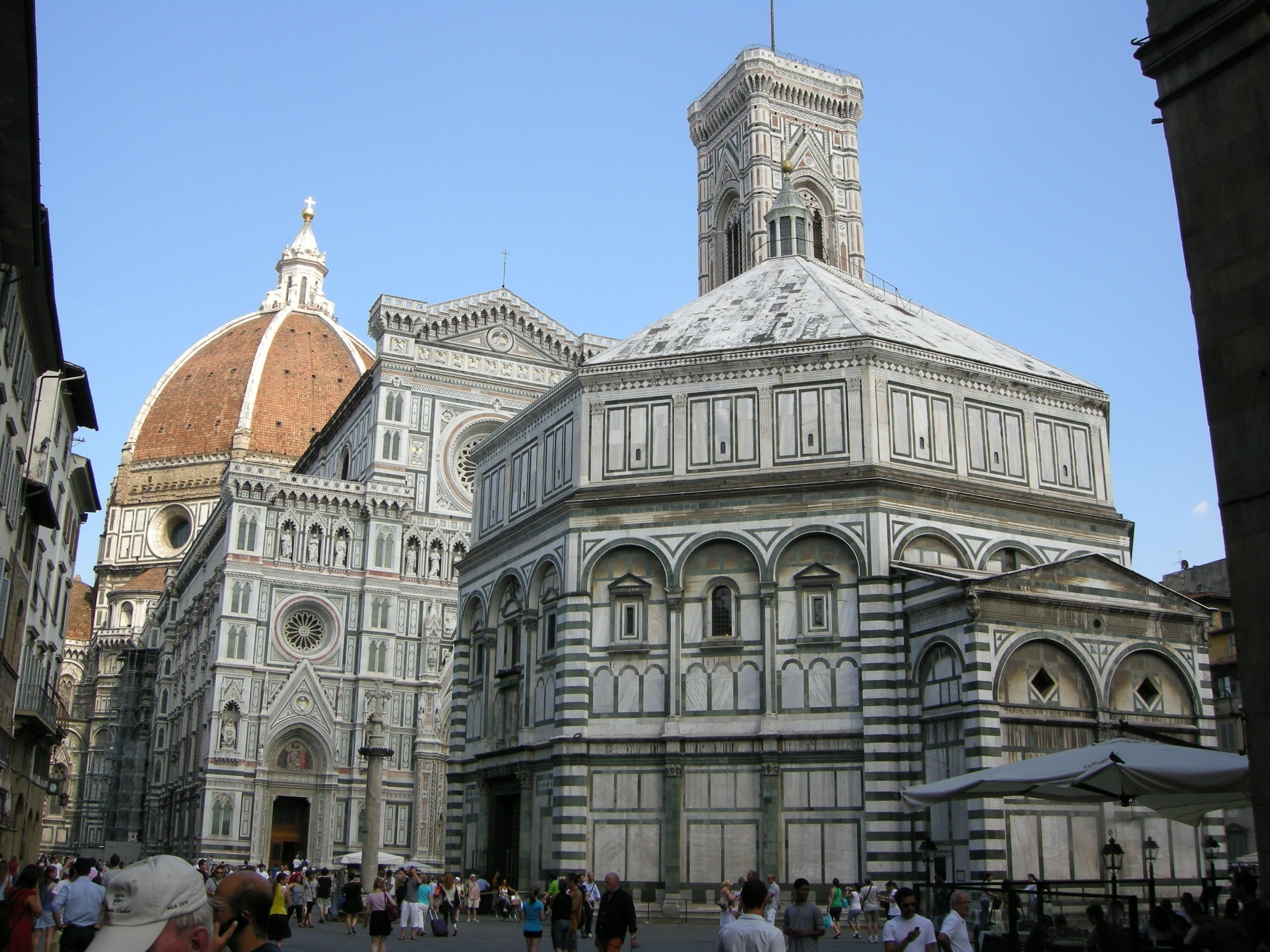 Piazza san giovanni da via cerretani, firenze